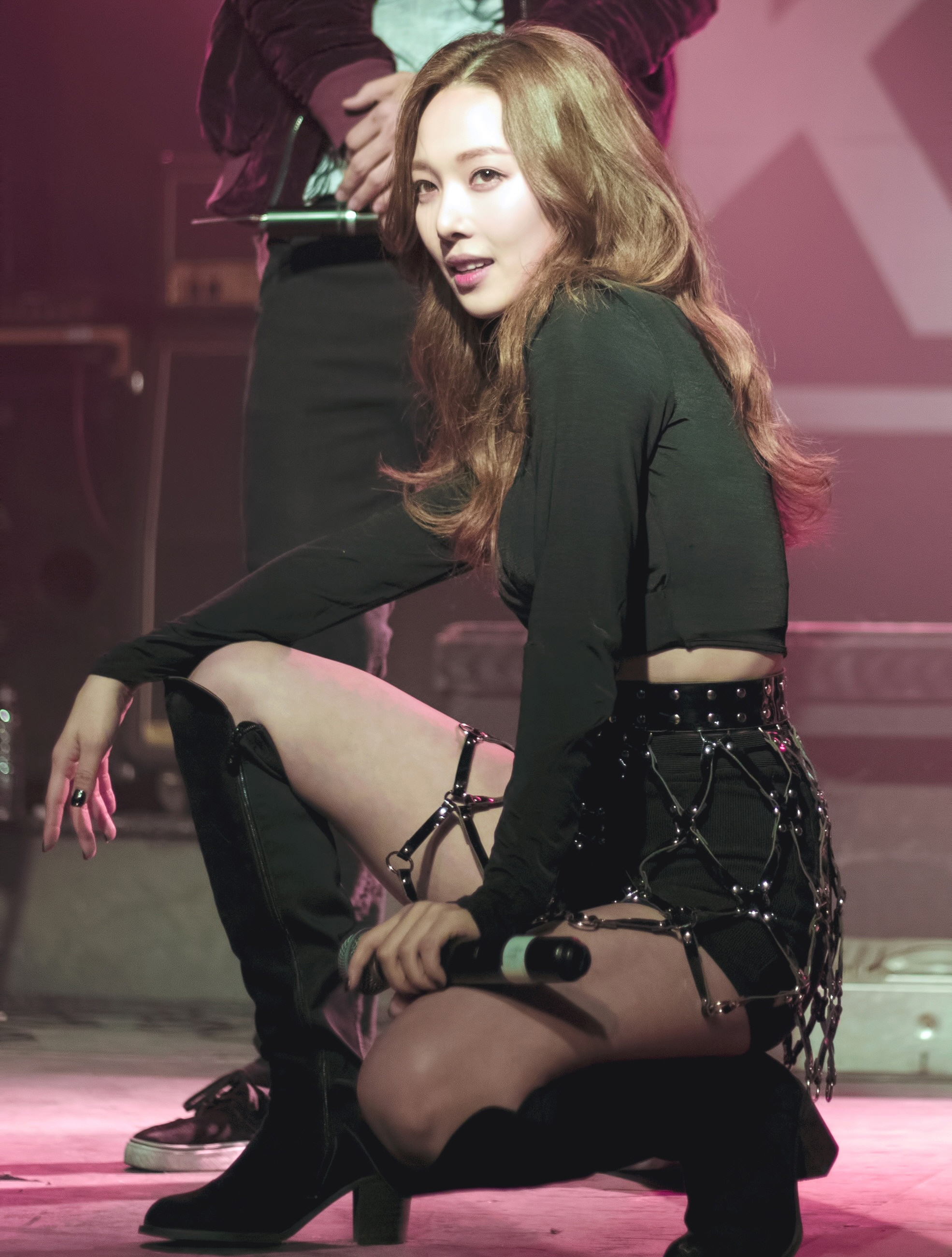 161212 신촌 KARD 데뷔파티 전소민 4Pic